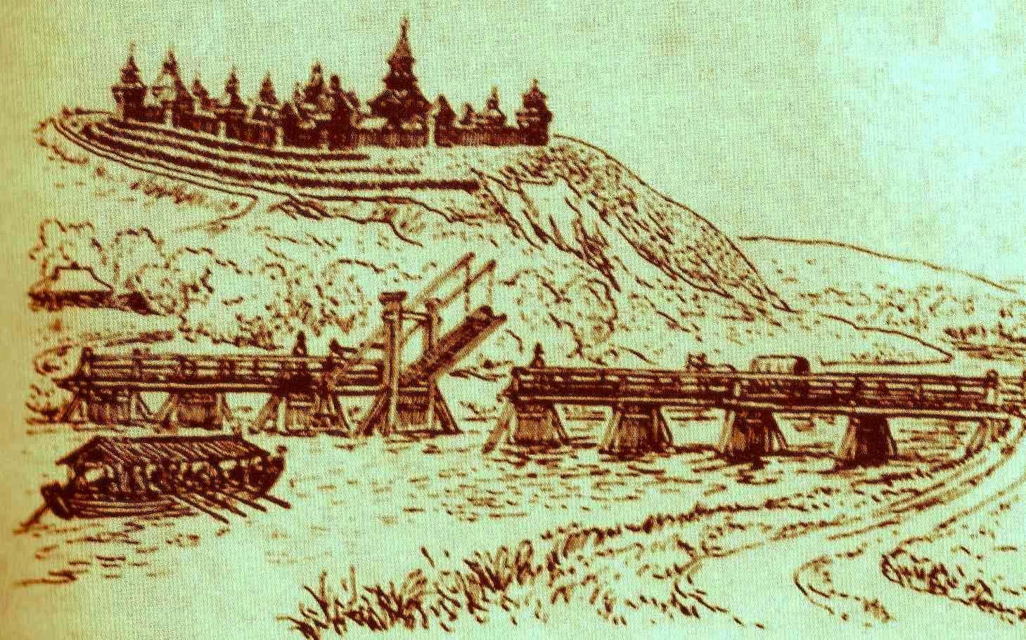 Рисунок Суджа-крепость сделан в 1996 году